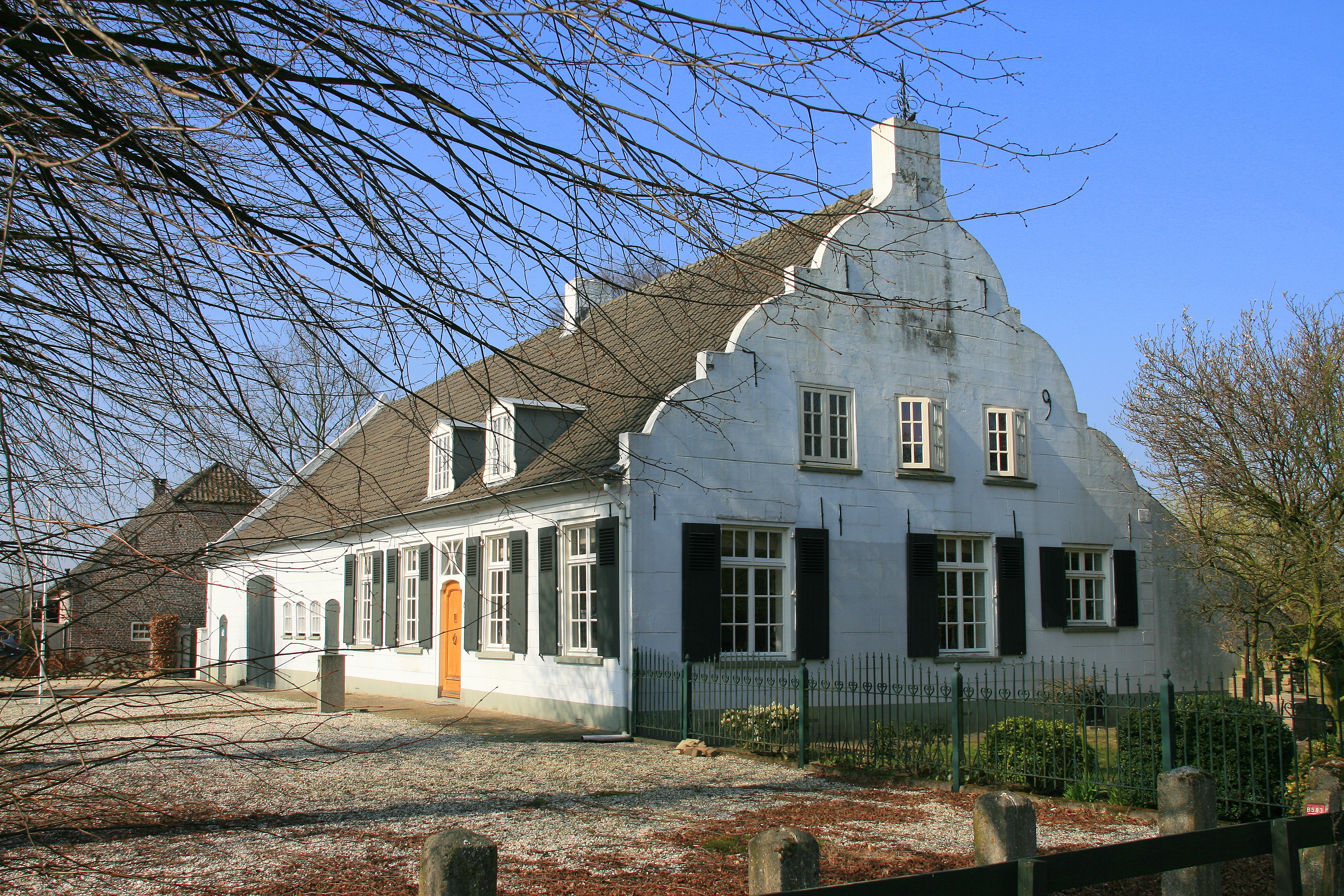 Het huidige aanzien van het rijke huis Kerkstraat 9, dat lange tijd als burgemeestershuis heeft gediend, stamt uit omstreeks 1875. Het pand bevat wellicht een oudere kern. Ook enkele geveldecoraties, met name de engelenkopjes in de frontons en de ionische kapitelen met kopjes onder de vensterbanken, kunnen laat-16de- of vroeg-17de-eeuws zijn.